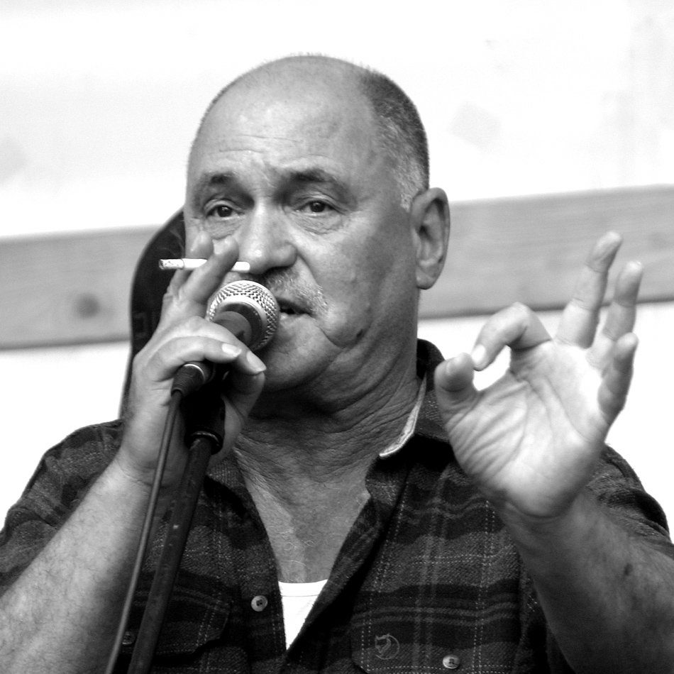 Rolly Brings, Kölner Musiker und Texter